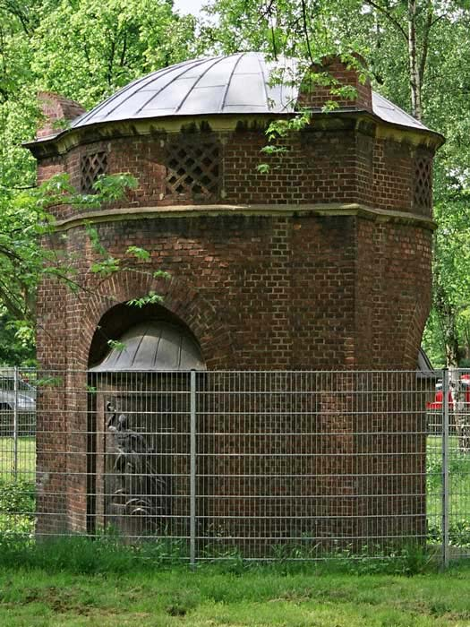 Transformatorenhäuschen mit Keramikreliefs von Erwin Holler, 1923, Köln-Sülz